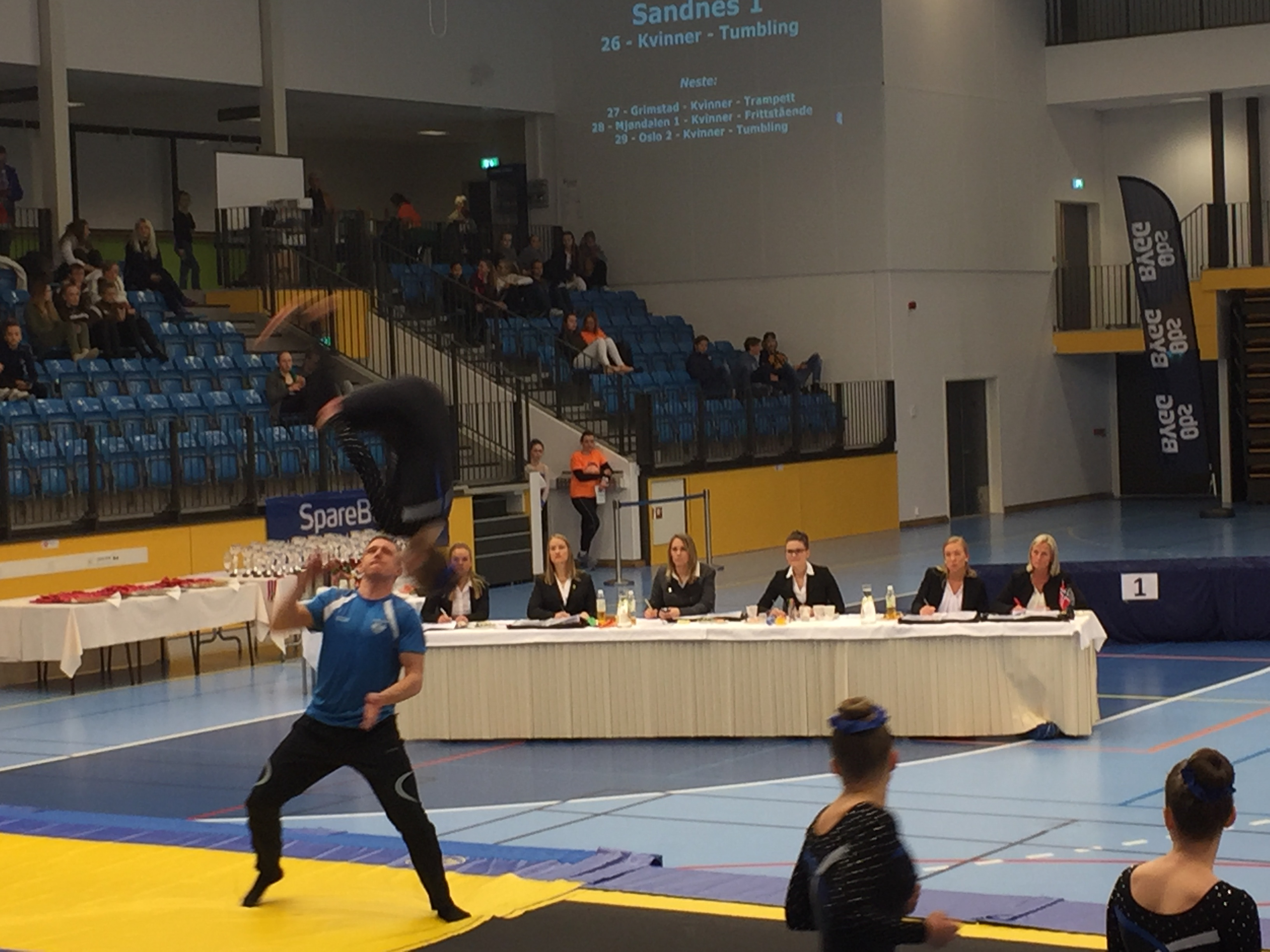 J-NM troppsturn 2017 Ringerike - Sandnes 1 kvinner tumbling